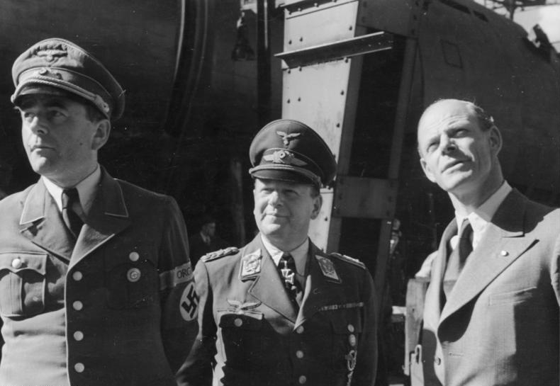 A. Speer, E. Milch, W. Messerschmitt ADN-Zentralbild/Archiv II. Weltkrieg, Inspektion eines Rüstungsbetriebes im Mai 1944 durch den Reichsminister für Rüstung und Kriegsproduktion Prof. Albert Speer (links) und Generalfeldmarschall Erhard Milch (Mitte), rechts Prof. [Willy] Messerschmitt Abgebildete Personen: Messerschmitt, Willy Ing.: Flugzeugbauer, Firmengründer, Wehrwirtschaftsführer, Bundesrepublik Deutschland GND 118581376 Milch, Erhard: Generalfeldmarschall, Ritterkreuz (RK), Luftwaffe, Deutschland (GND 118582402) Speer, Albert Prof. Dr.: Reichsminister für Rüstung und Kriegsproduktion, Architekt, Deutschland (GND 118615998)